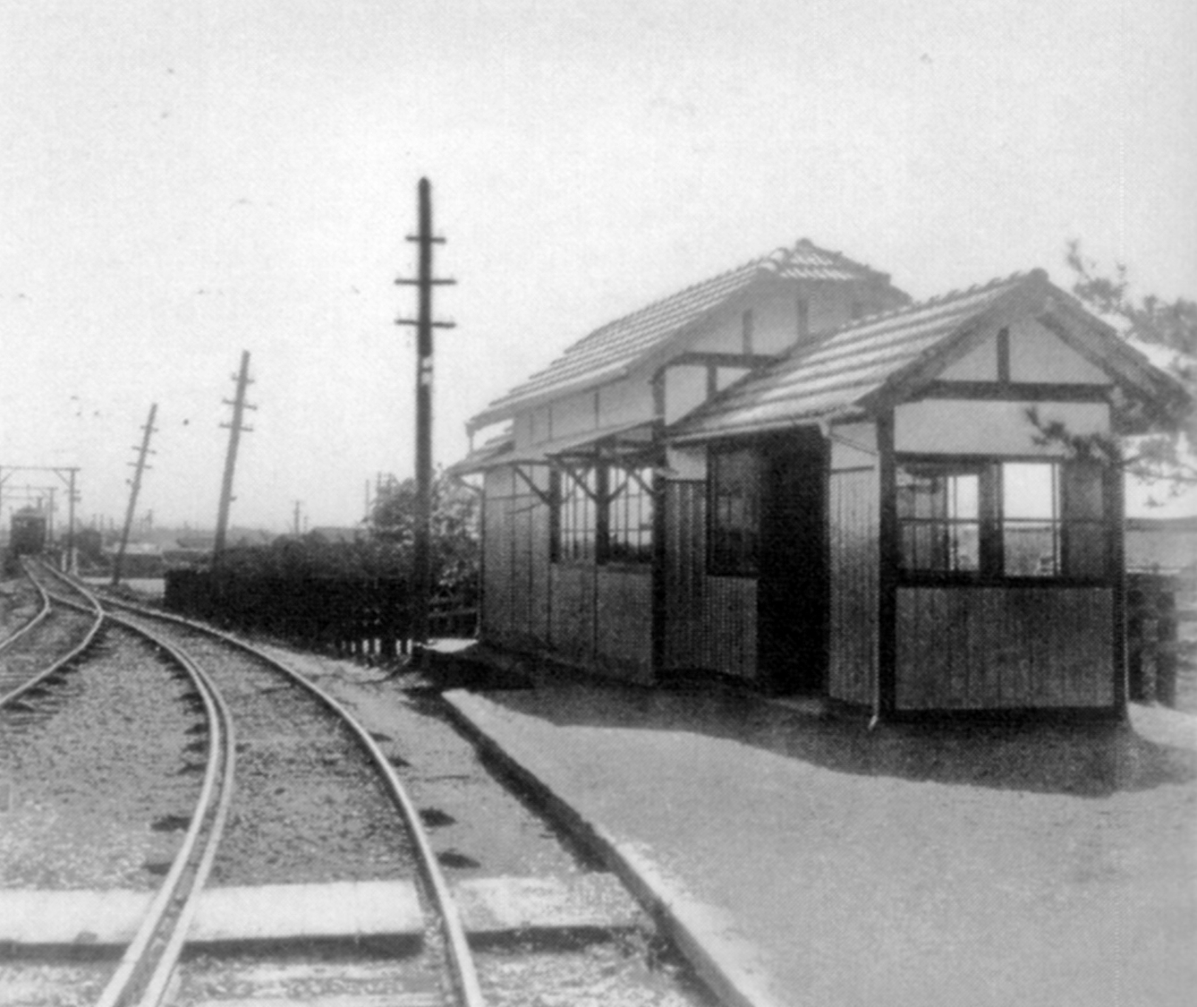 守山口駅